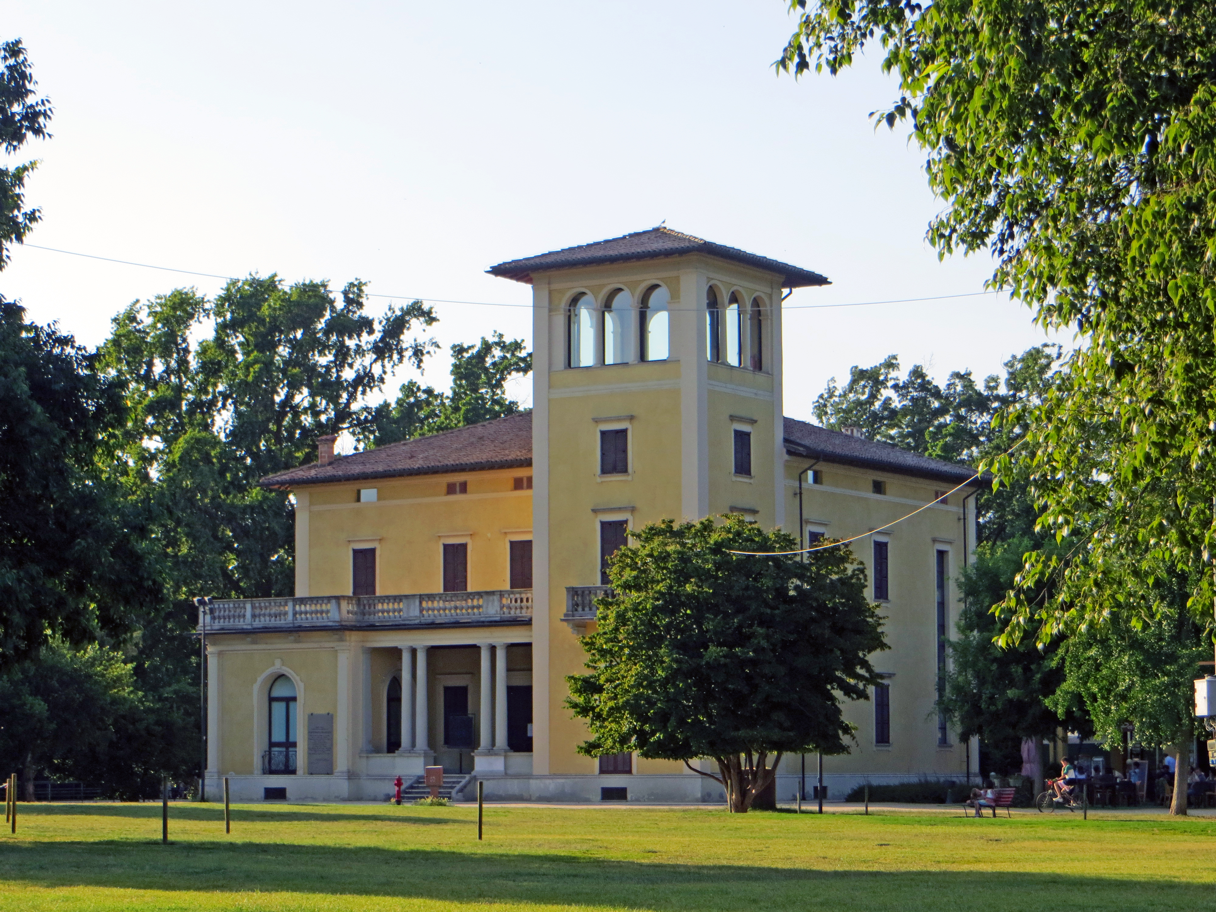 Villa Soragna (Collecchio) - facciata e lato sud